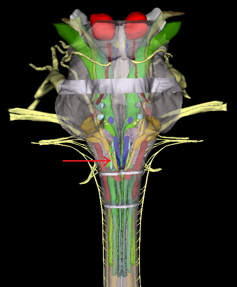 Enbor entzefalikoaren atzeko ikuspegia da, geziak nukleo anbiguoa adierazten du.